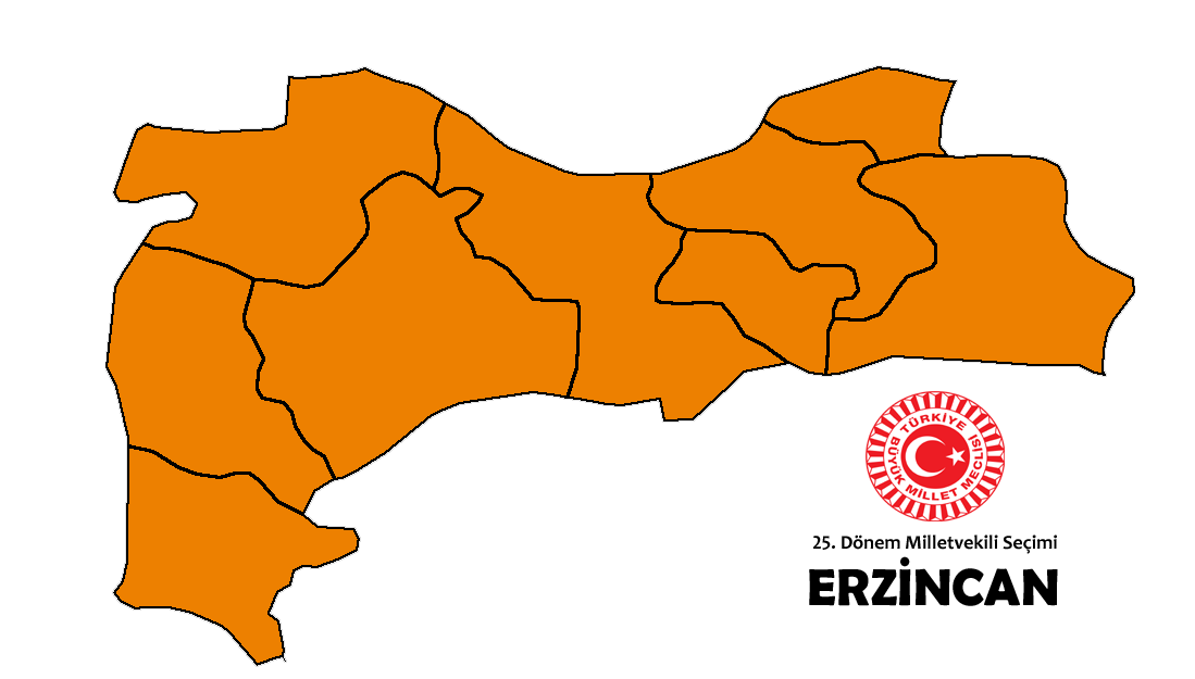 2015 genel seçim sonuçları